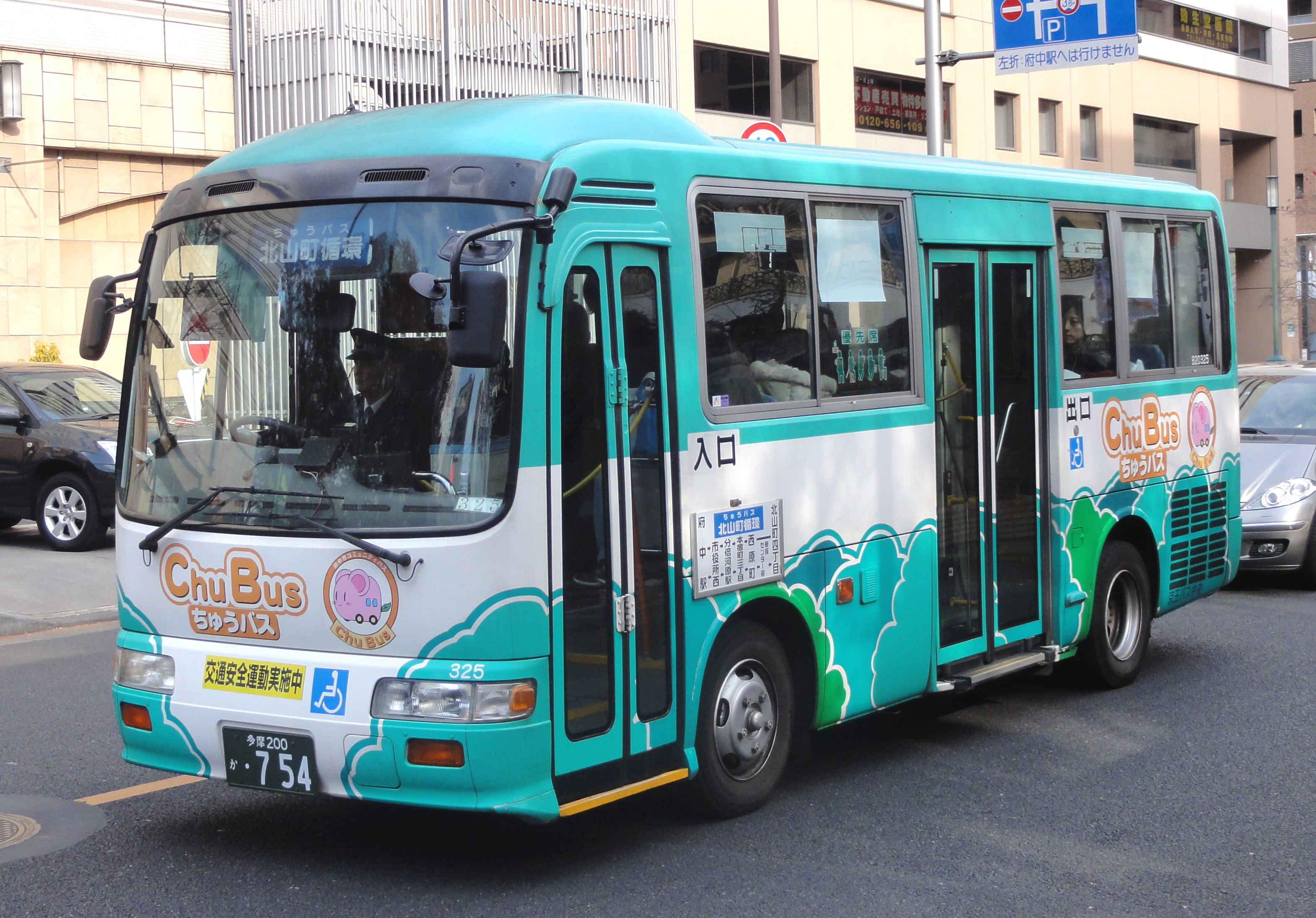 ちゅうバス（東京都府中市のコミュニティバス）